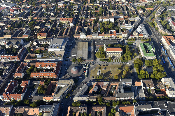 Az Újpesti Szent István tér és szomszédos háztömbök (kb 100 épület) látképe a magasból